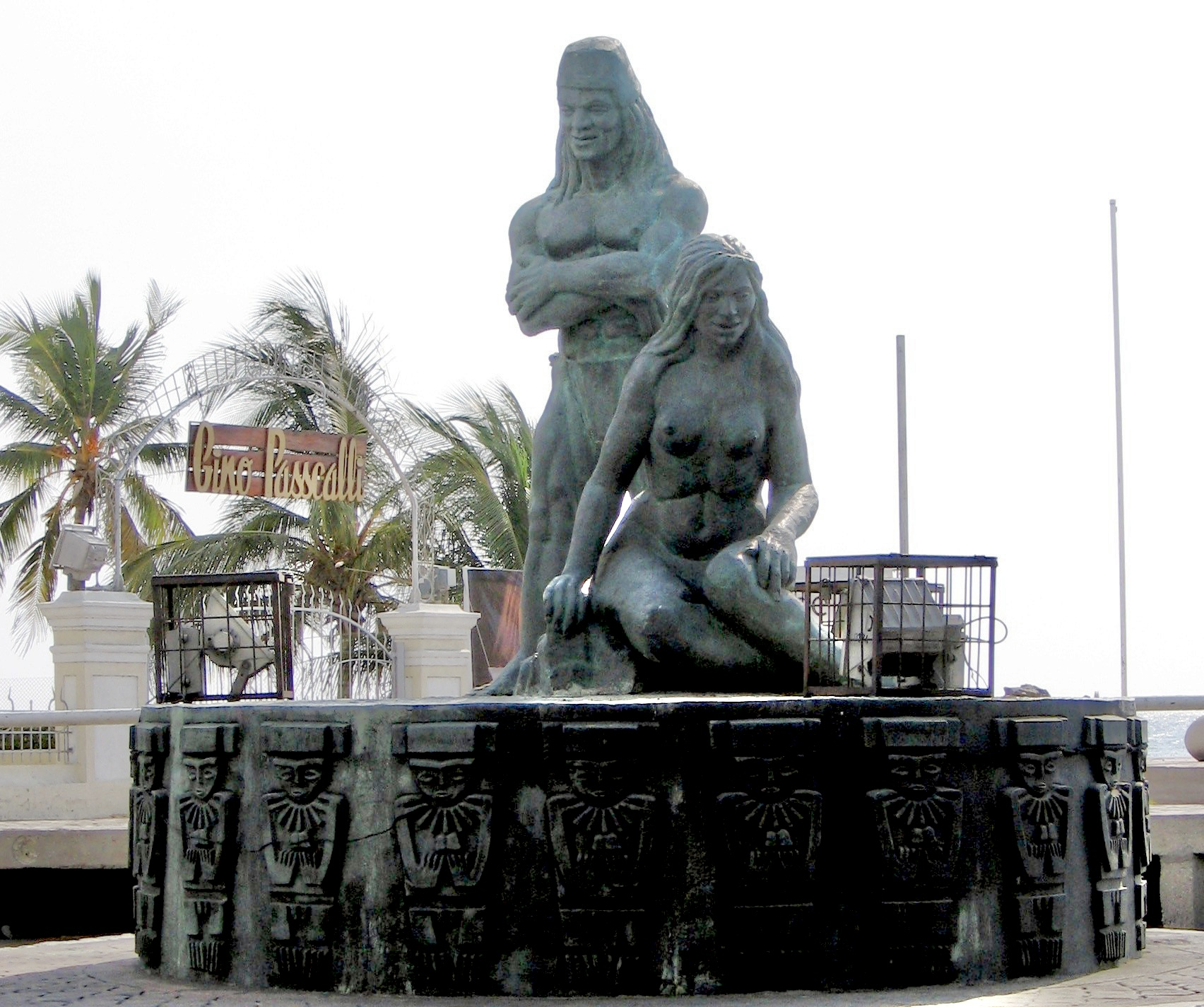 Monumento que representa a miembros del pueblo arhuaco Monumento Tayrona en Santa Marta, Colombia. Statue of the Tayronas in Santa Marta, Colombia.